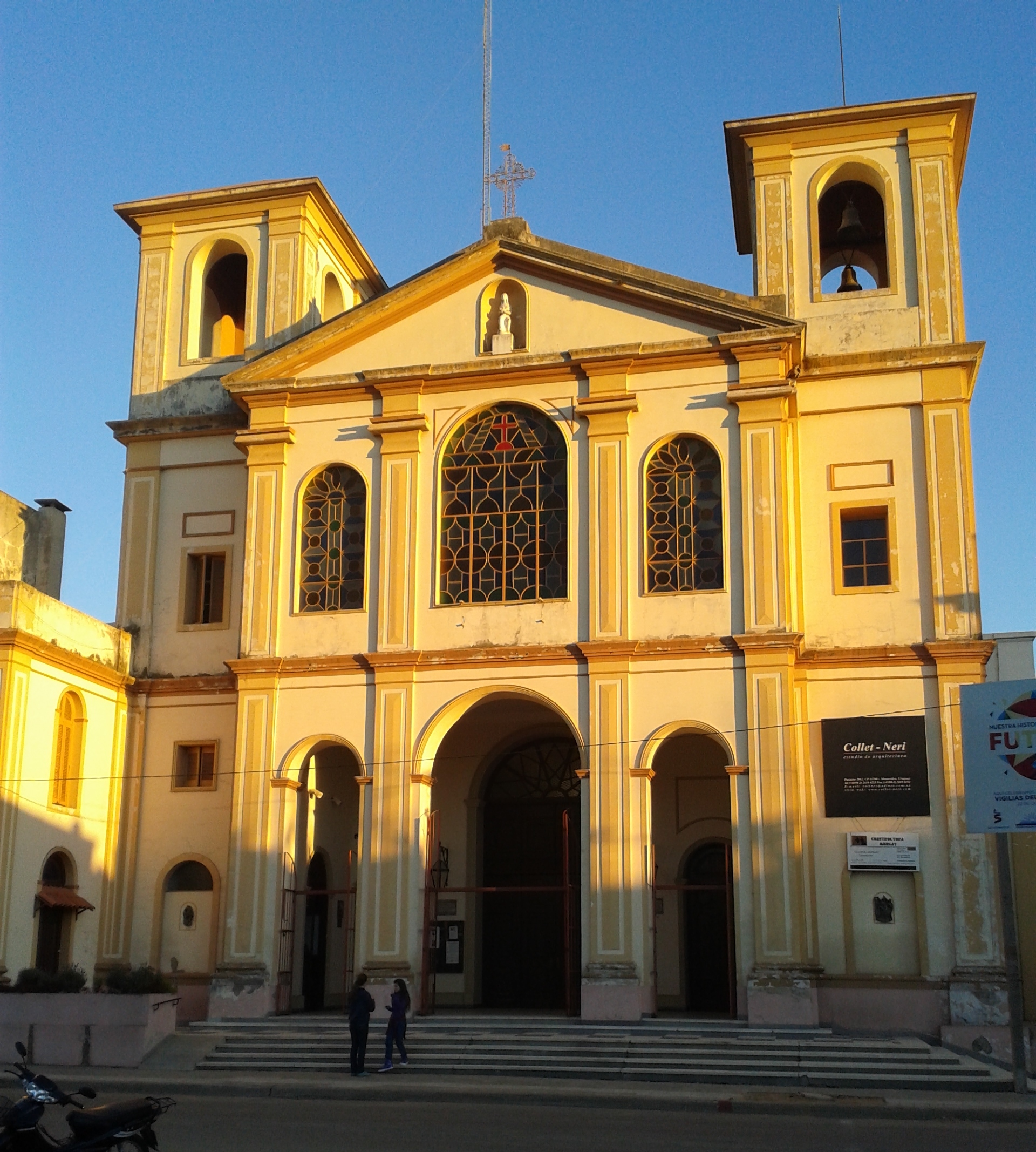 Iglesia Catedral de Nuestra Señora del Pilar.. Ubicada en el departamento de Cerro Largo